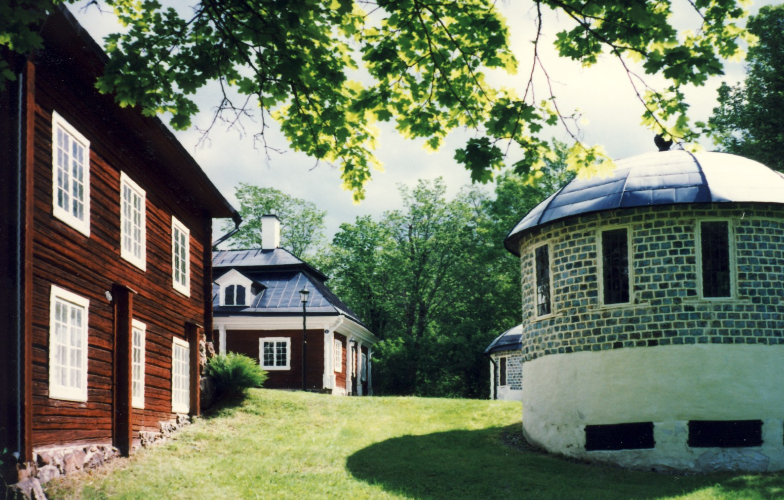 Engelsbergs bruk i Västmanland, Sverige